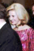 Anna Murdoch